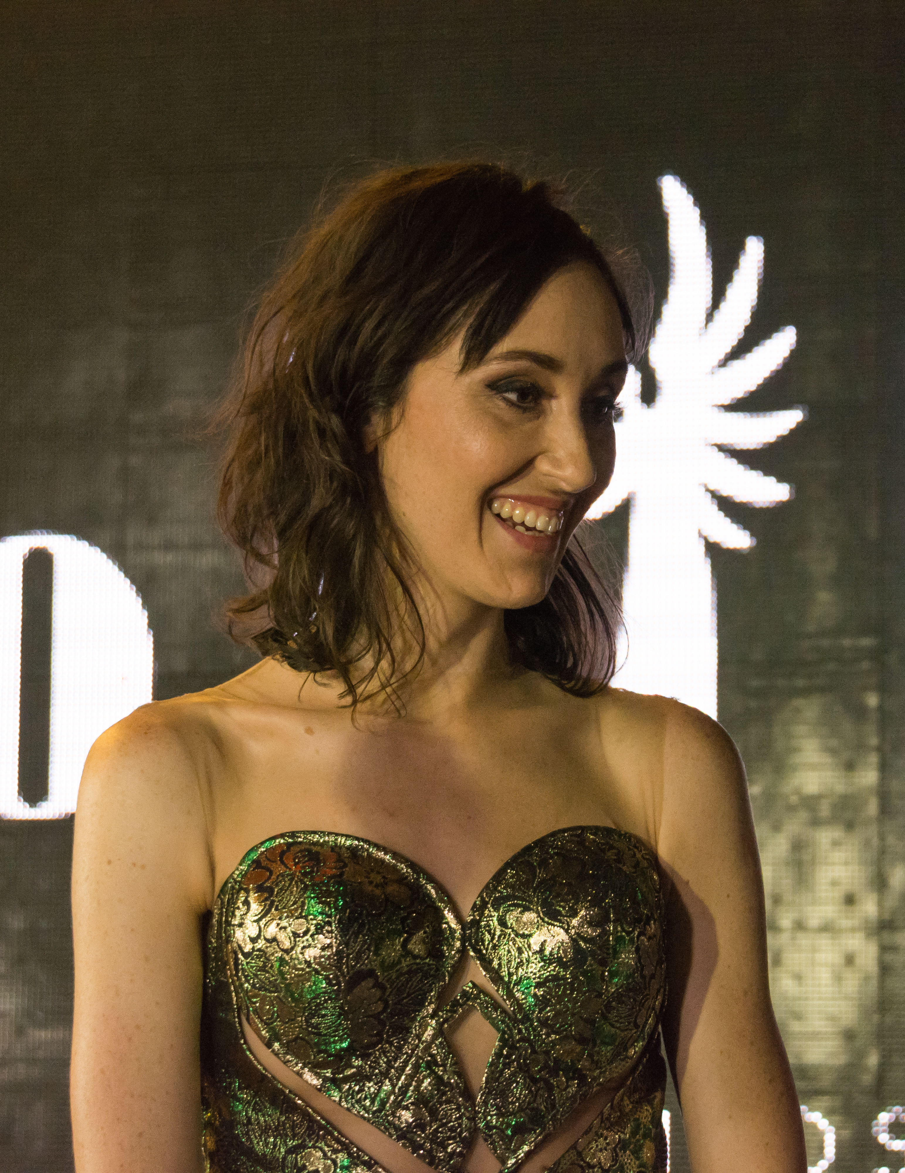 Valentina Muhr, Premios Caleuche, Teatro Oriente, Providencia, Santiago, Región Metropolitana de Santiago, Chile.